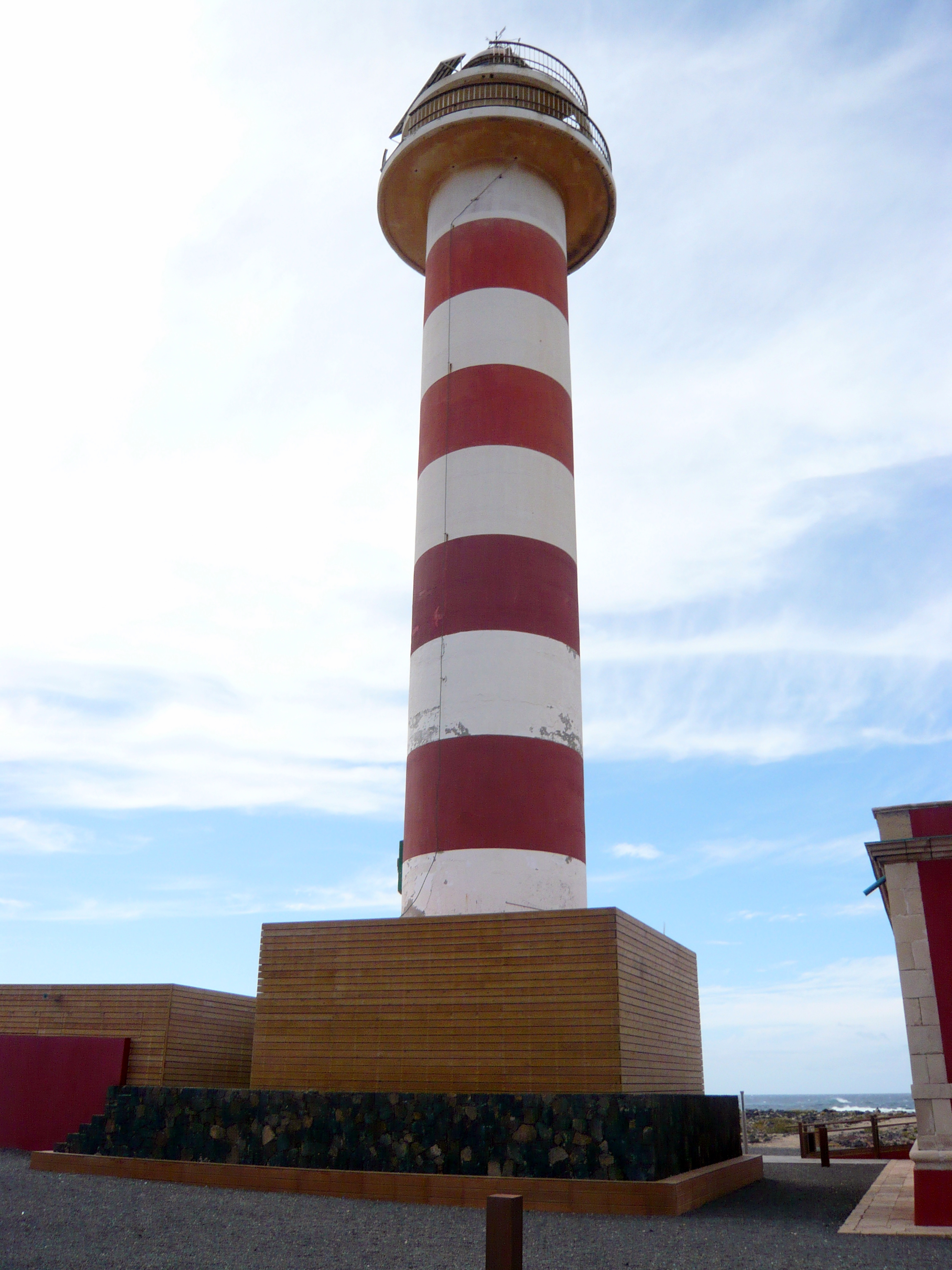 Tostón (Punta de la Ballena), Isla de Fuerteventura, Gran Canaria, Spain